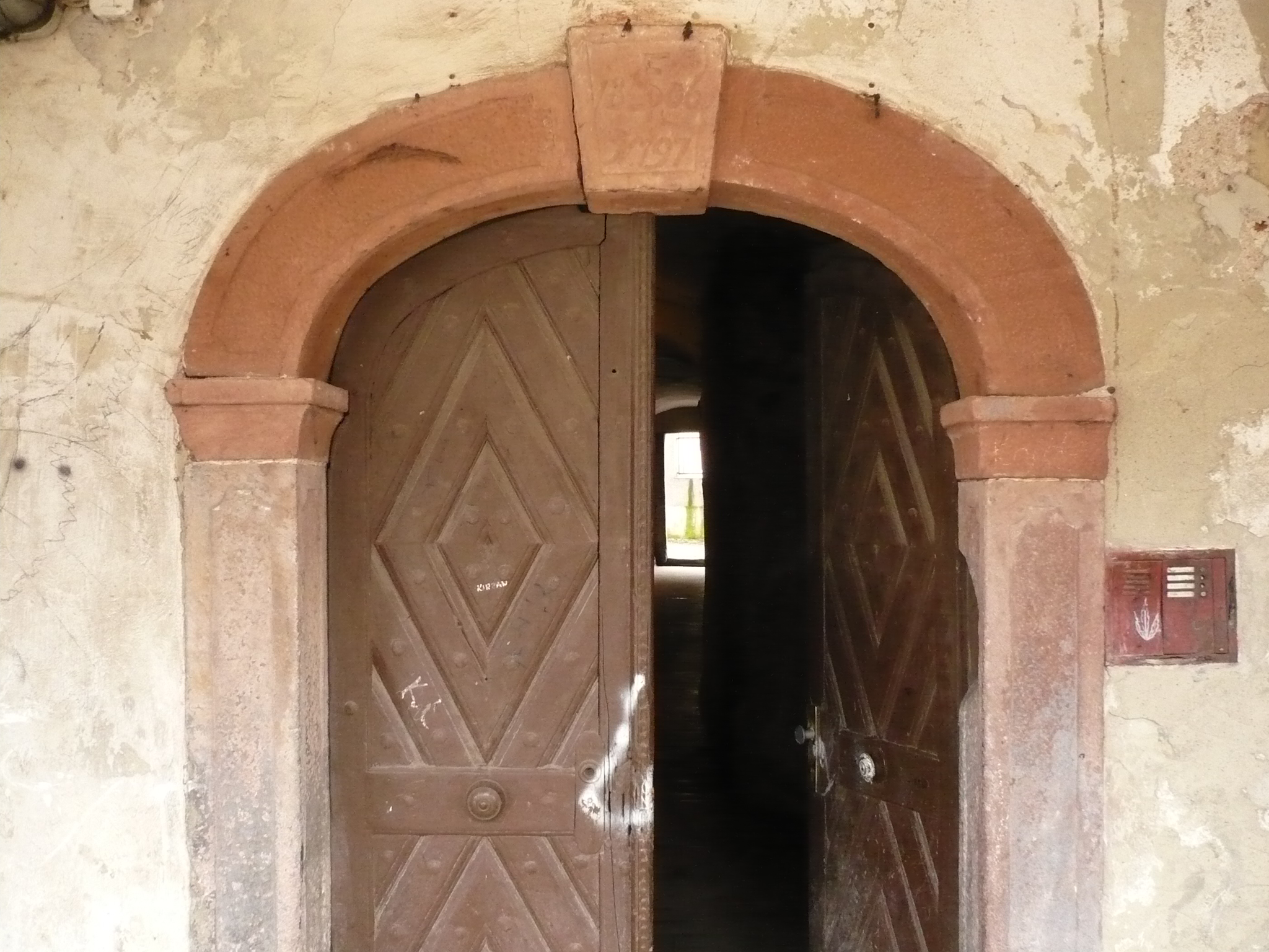 Nowa Ruda, ul. Nadrzeczna 2 - dom tkaczy, brama (zabytek nr A/927/1336/WŁ z 7.05.1991